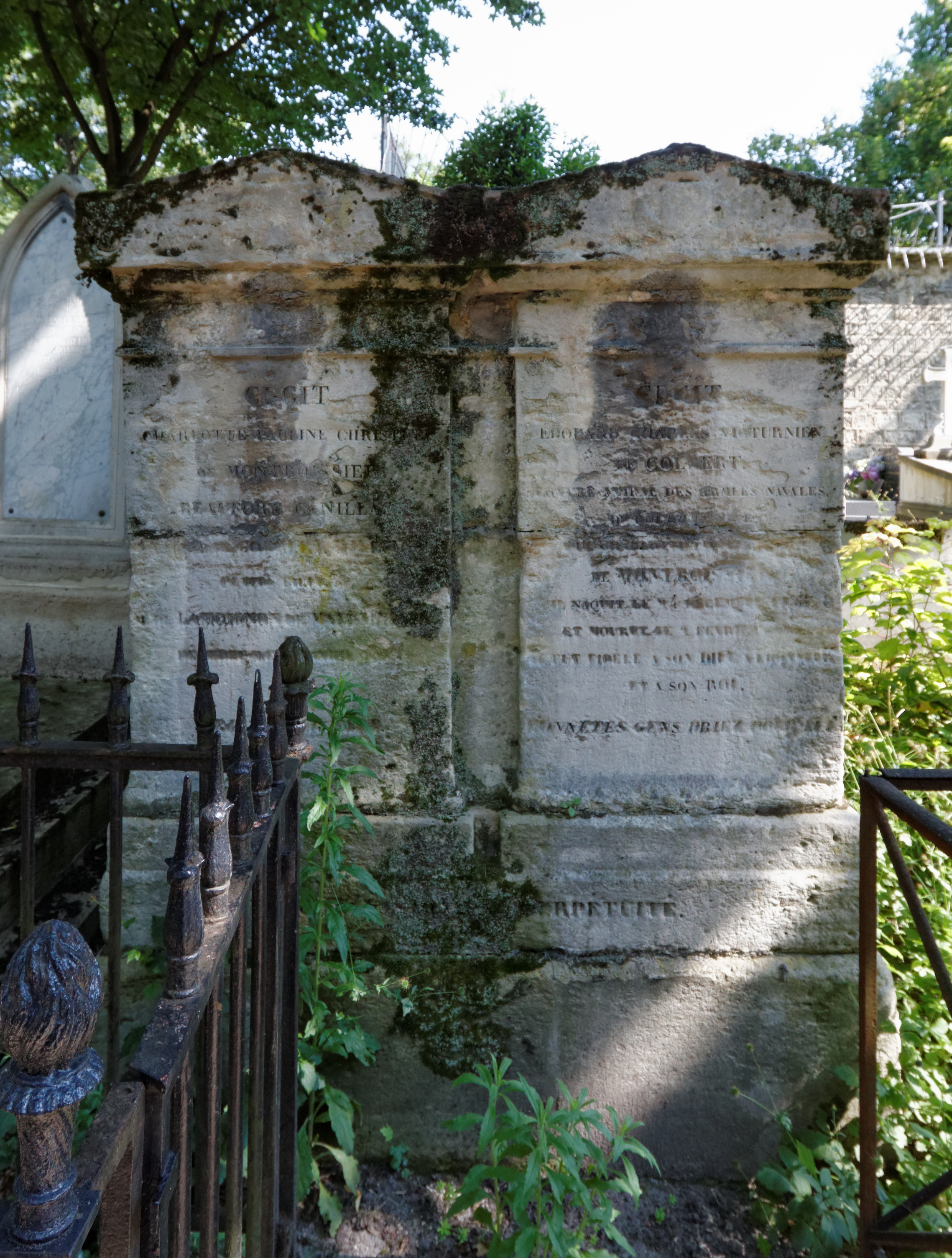 Vue d'ensemble